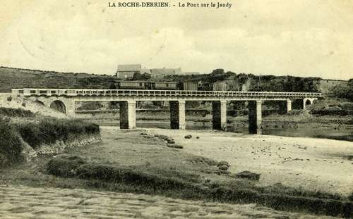 Passage du train des Chemins de Fer des Côtes-du-Nord sur le pont sur le Jaudy à La Roche Derrien (Bretagne). Photographie prise de la rive sud, côté La Roche-Derrien. De l'autre côté, en Minihy-Tréguier, sur la butte, on aperçoit le ferme du Pénity. Entre les arches, on aperçoit la route de La Roche-Derrien à Tréguier.